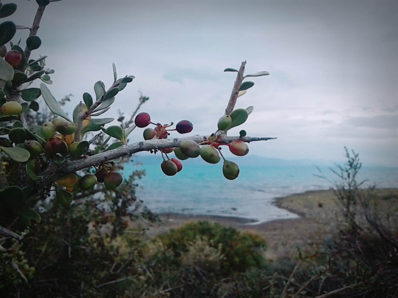 Arbusto de el calafate posando frente al lago.Lago Argentino